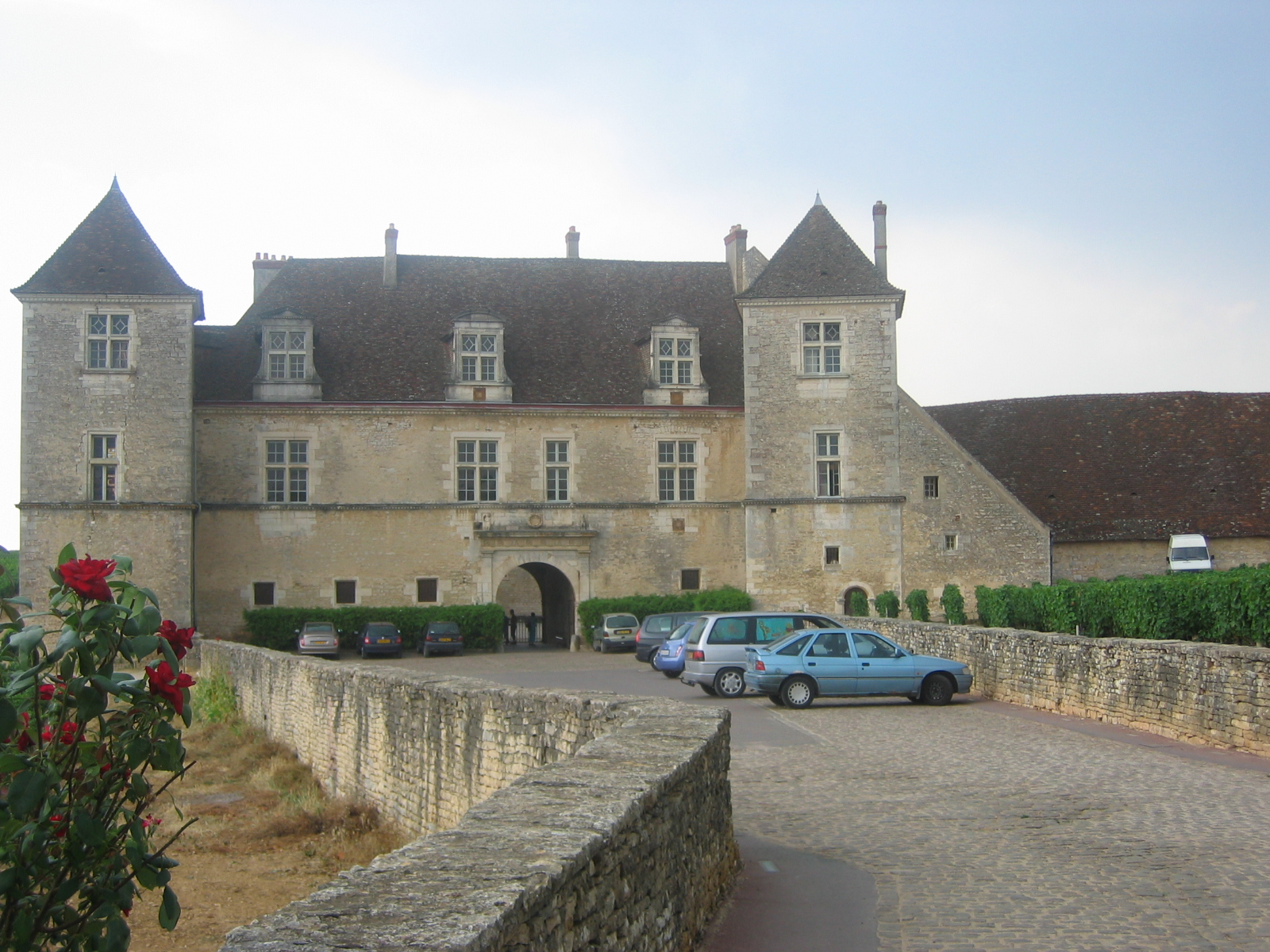 Château Vougeot, Bourgogne, France.